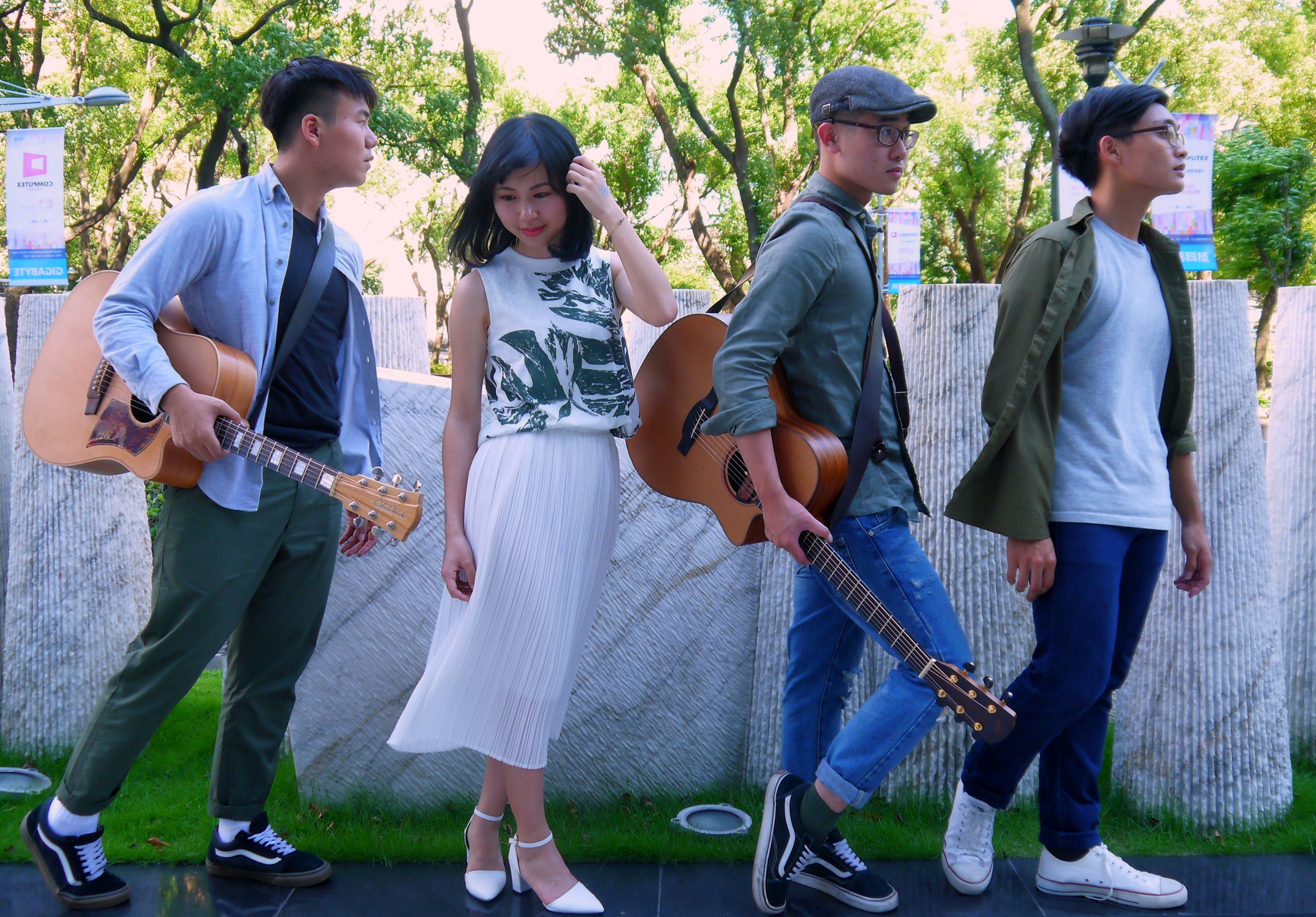 Control T